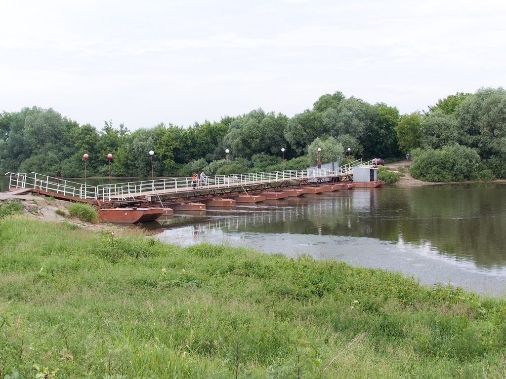 Bridge over Moskva River in Kolomna